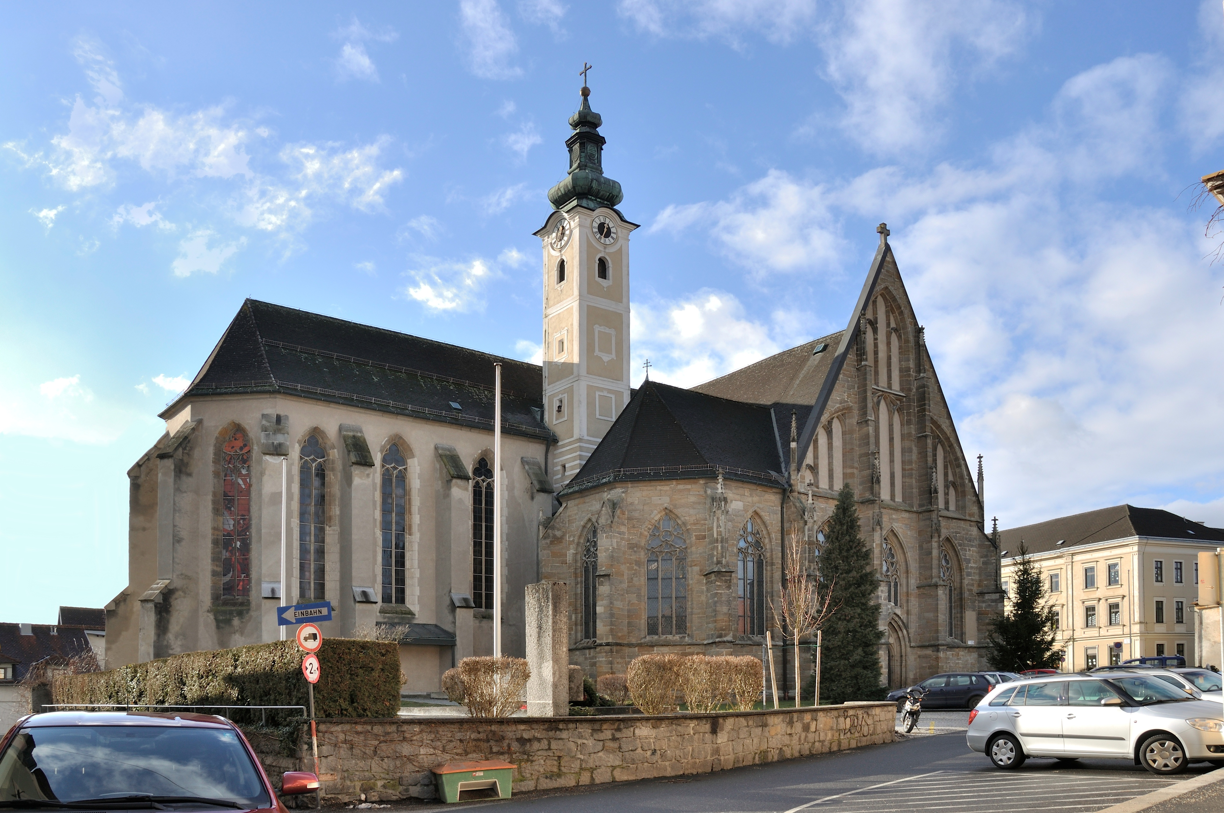 Stadtpfarrkirche hl. Maria und Reste d.abgekommenen Klosterbauten